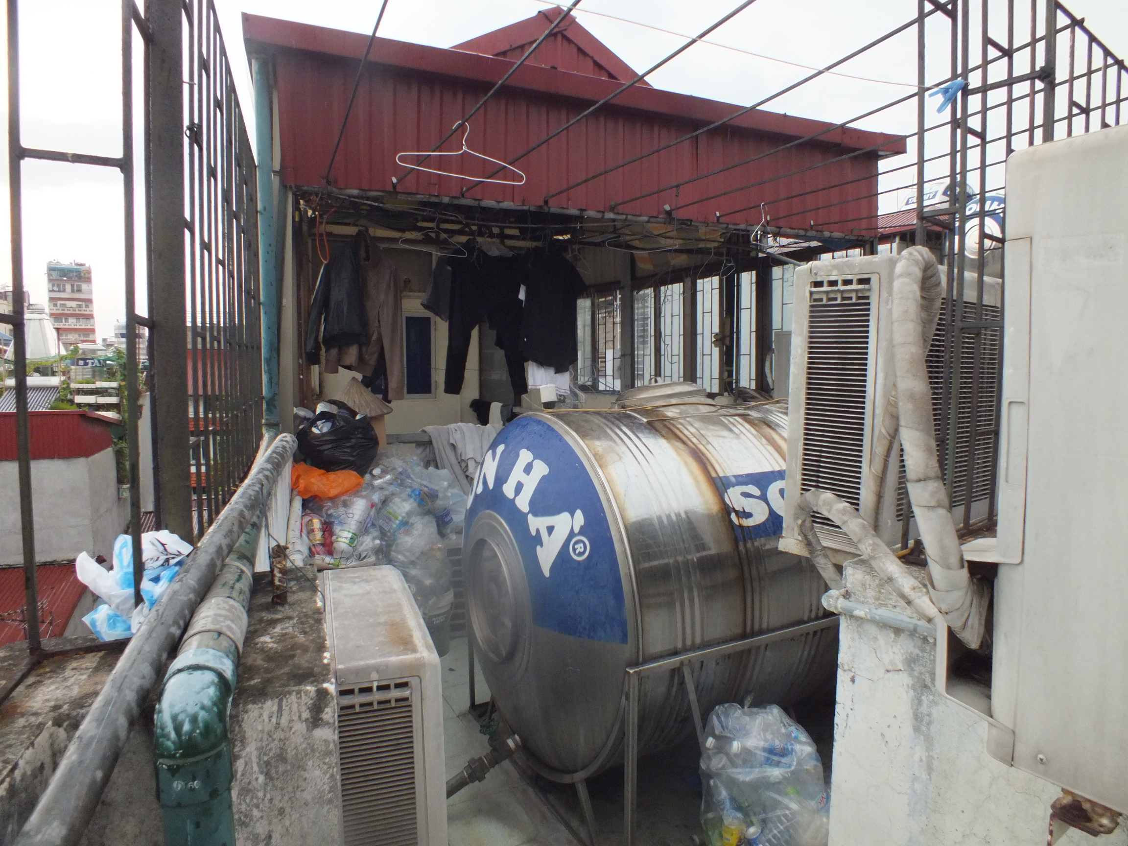 Minh Toan Hotel 23 Hang Non, Hoan Kiem district, Hanoi, Vietnam